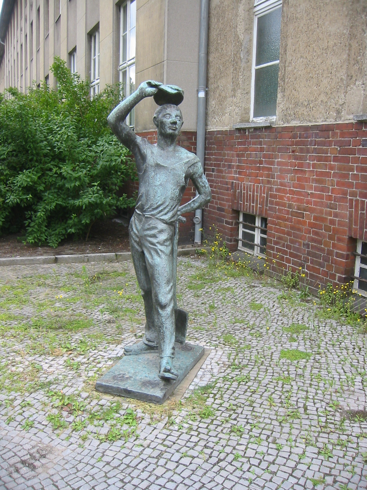 Vor dem Bezirksamt Treptow-Köpenick an der Ecke Rinkartstraße/Bodelschwinghstraße befindet sich eine Bronzeskulptur von Karl-Heinz Schamal mit dem Titel "Der Gärtner". Sie stammt aus dem Jahr 1962/66 und ist rund 189 cm hoch.